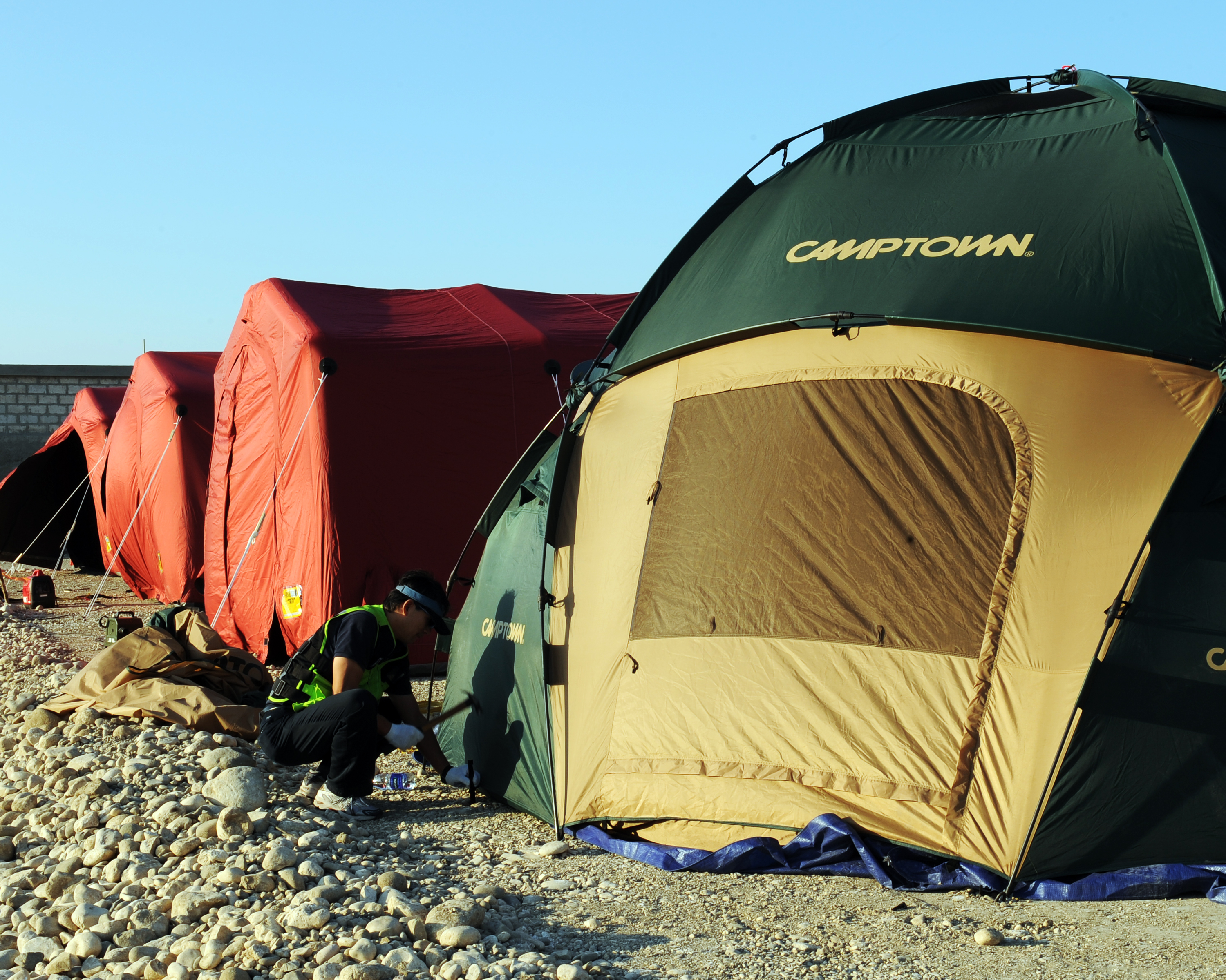 100210중앙119구조본부 아이티 대지진 출동